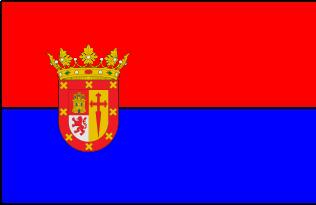 bandera del pueblo